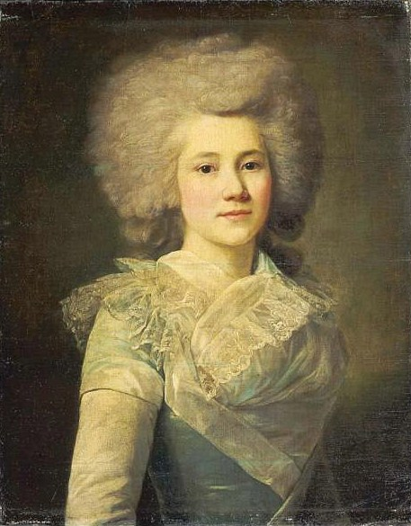 Евгения Сергеевна Долгорукая. 1789, ГМИИ